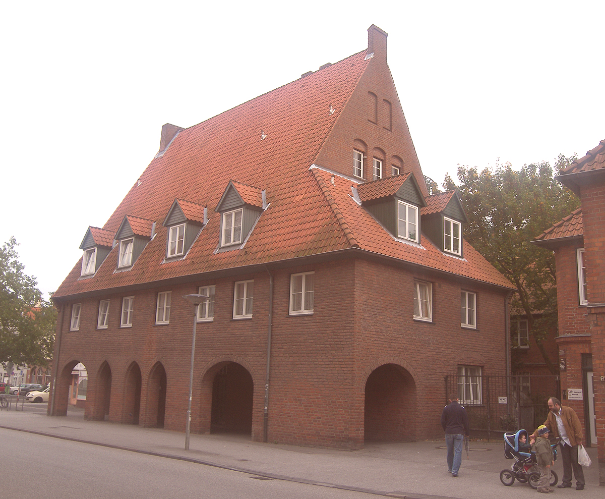 In diesem Haus ermordete am 5.Mai 1980 der arbeitslose Fleischer Klaus Grabowski die siebenjährige Anna Bachmeier. Grabowski wurde später im Saal des Lübecker Gerichtes von Annas Mutter, Marianne Bachmeier, mit sieben Schüssen aus einer in den Gerichtssaal eingeschmuggelten Pistole niedergestreckt.